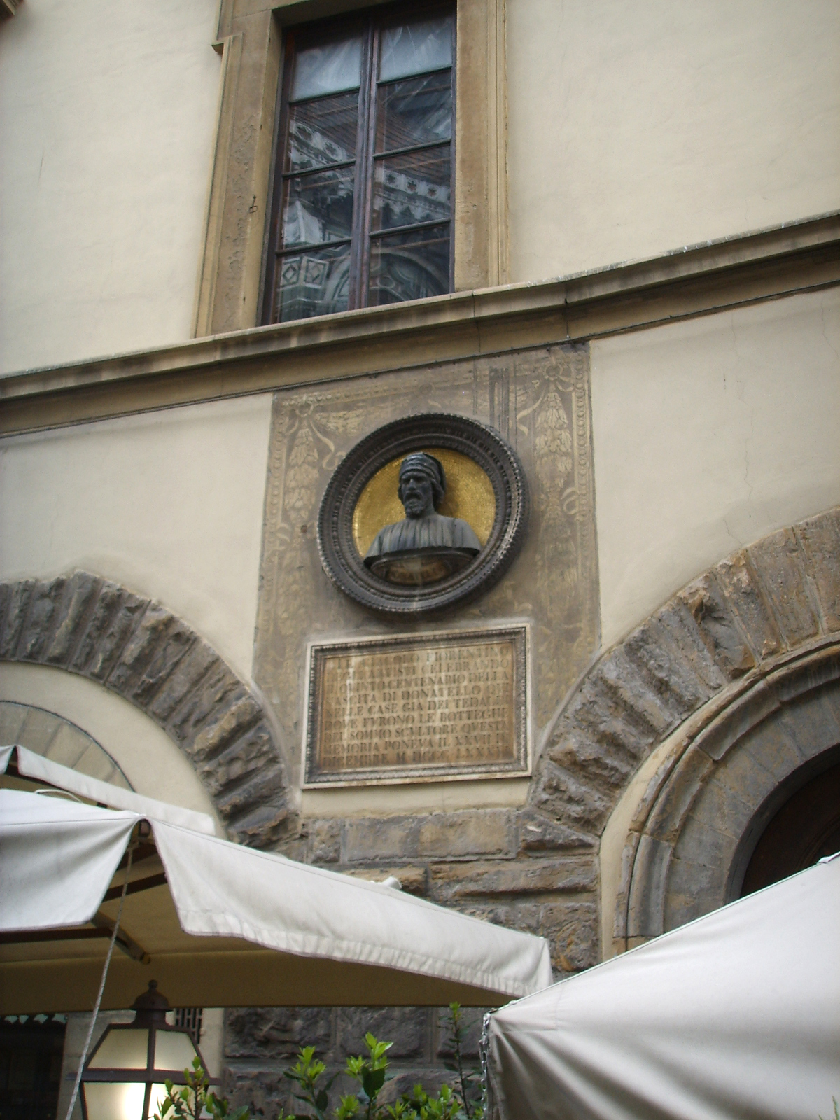 Palazzo_Naldini in Florence